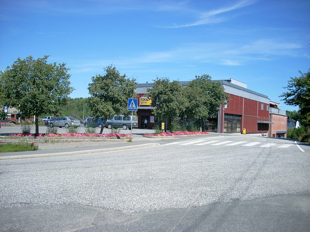 Eydehavn torv med Coop Prix, Arendal kommune, Norge, Tatt ca mot nord